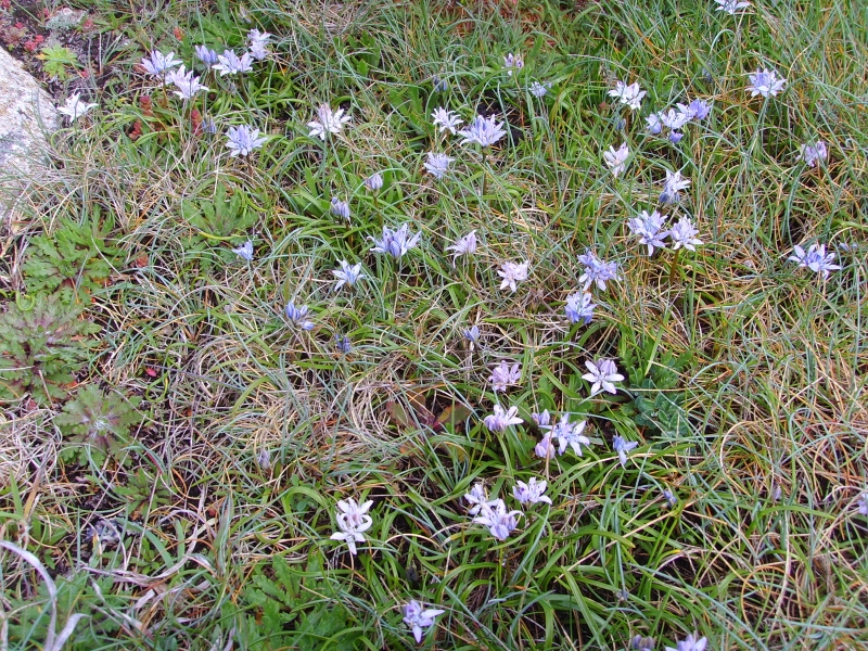 Groupe de Scilla verna, Beg ar Van, Cléden-Cap-Sizun, Finistère, France